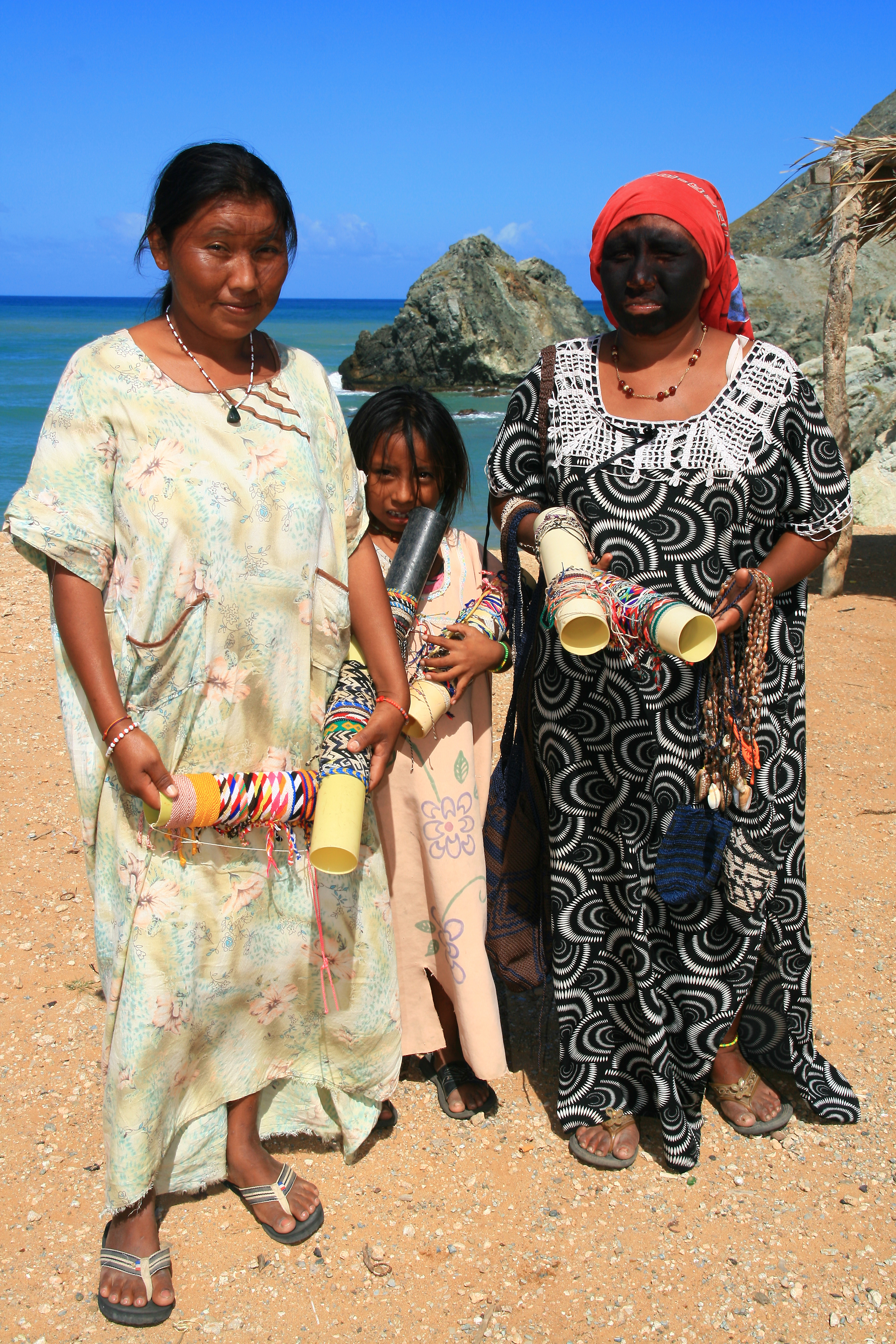 Guajiran artisans